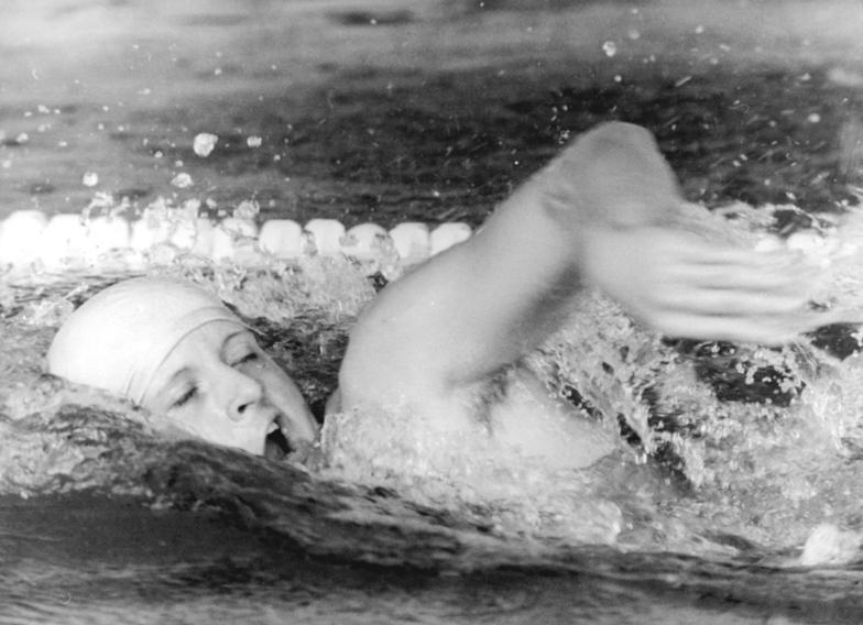 Kornelia Ender ADN-ZB Mittelstädt 2-6-76 Berlin: 27. Meisterschaften der DDR im Sportschwimmen (2.Tag)-Mit der phantastischen Weltrekordzeit von 1:59,78 min gewann Kornelia Ender (SC Chemie Halle) den Entscheidungslauf über 200 m Freistil der Damen. Siehe ADN-Meldung vom 2.6.76.